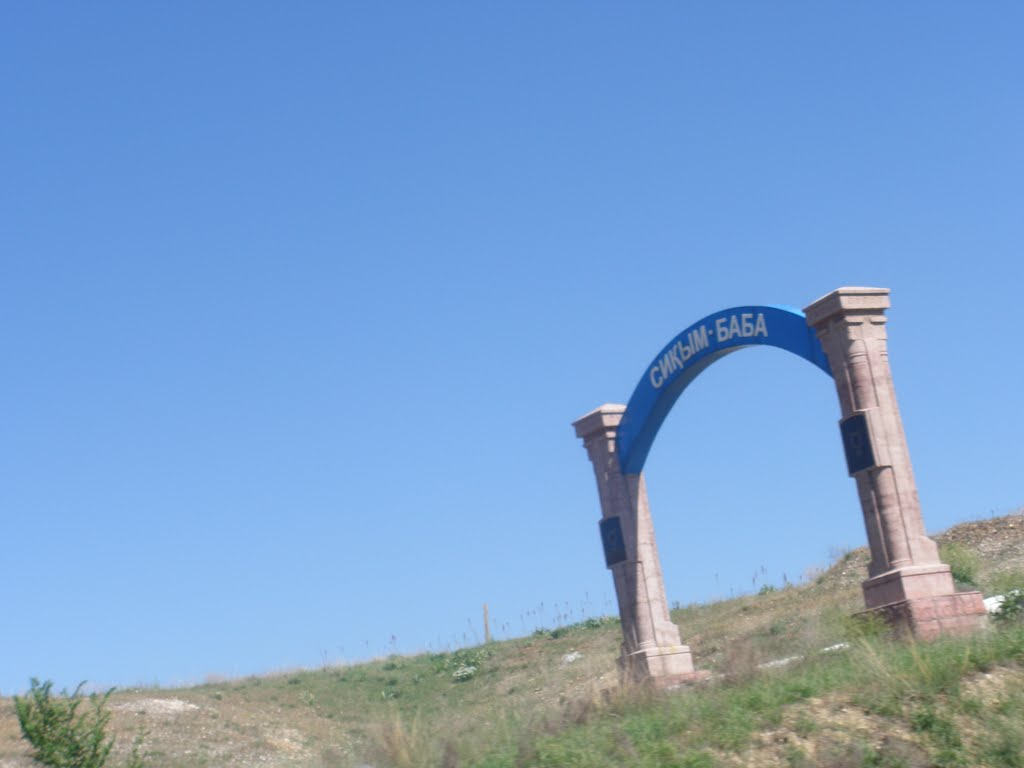 Қазақша (кирил): Сыйқым баба кесенесінің алды